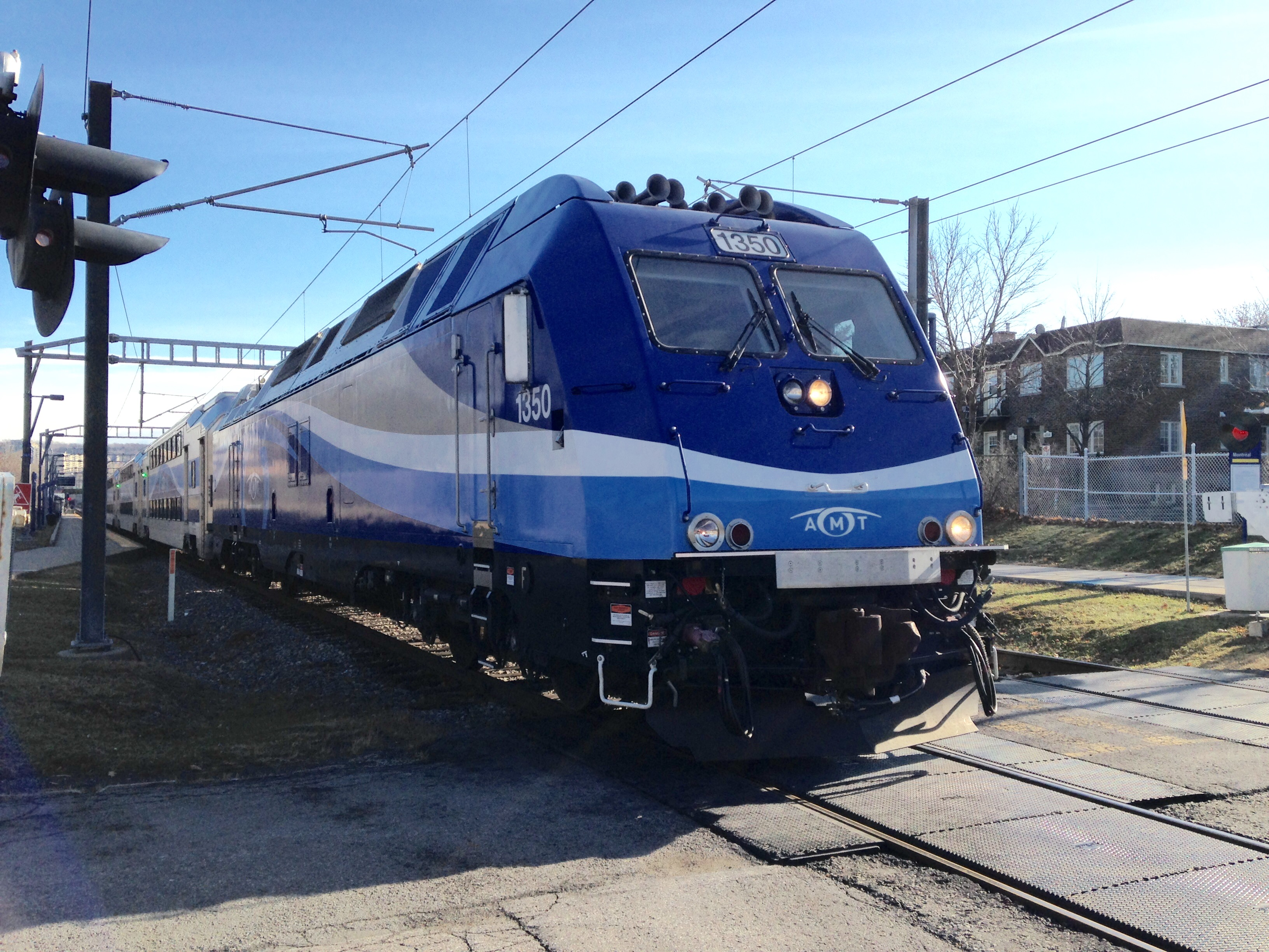 Mascouche Line